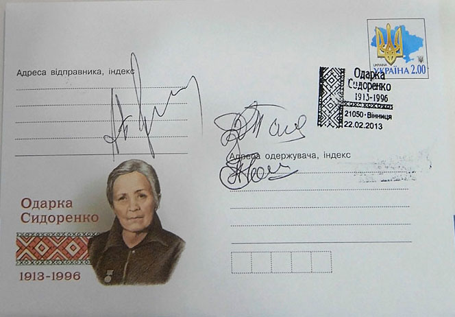 художній маркований конверт, присвячений Одарці Сидоренко